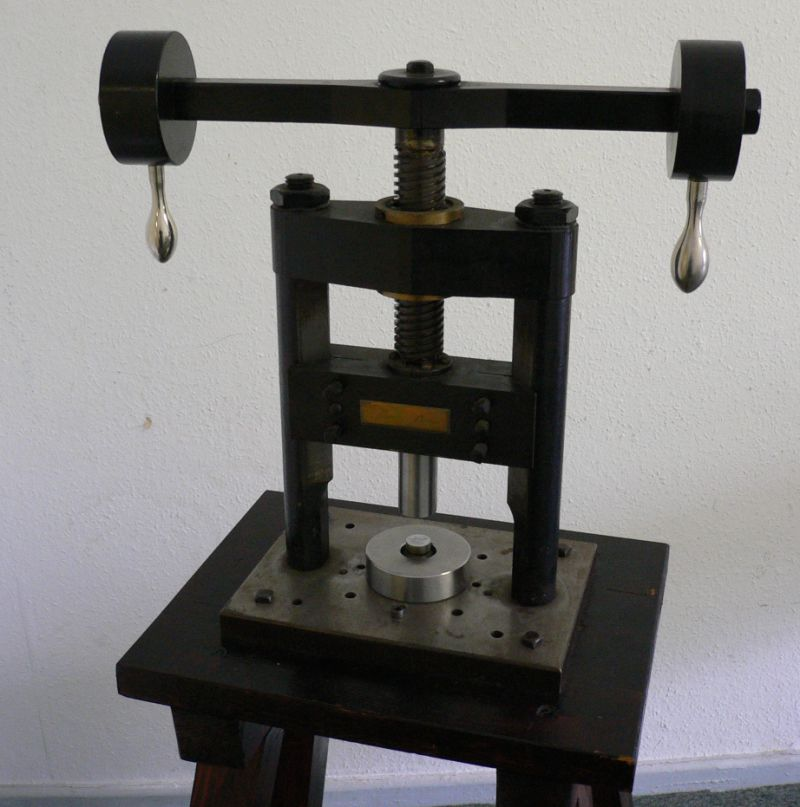 Numis-spindel, fotografiert auf einer Münzausstellung der Münze Berlin 2005.